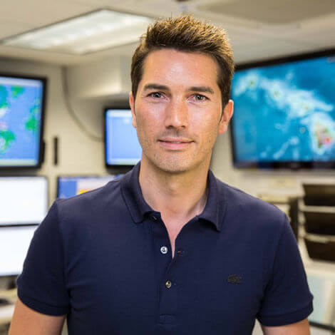 ProSieben-Moderator Stefan Gödde bei Dreharbeiten zu einem Galileo Spezial im Pacific Tsunami Warning Center auf Oahu, Hawaii.